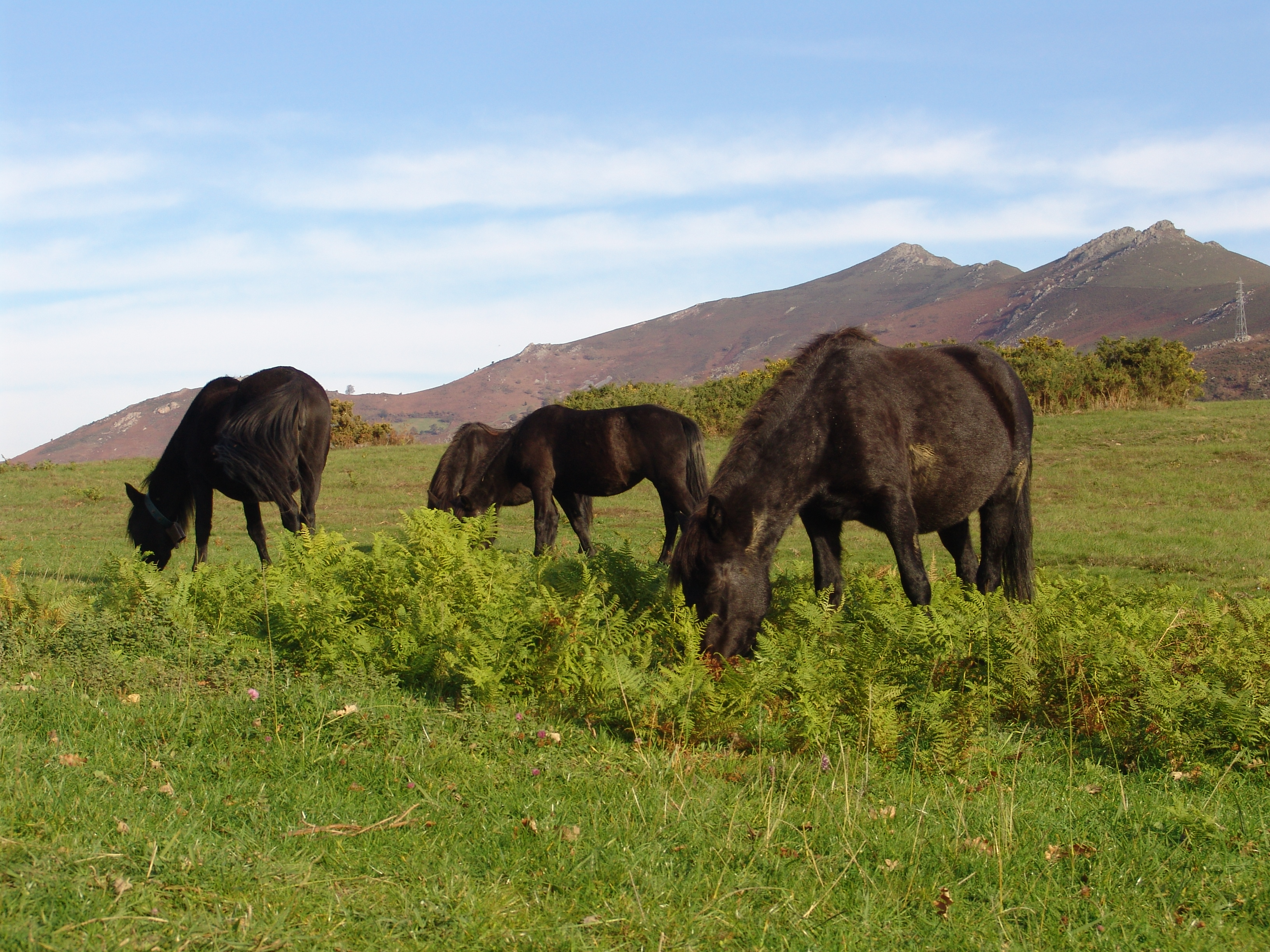 pottoka